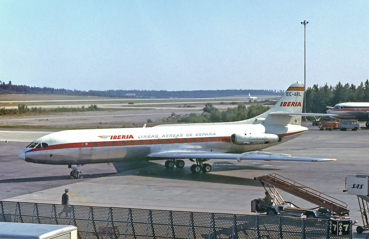 EC-ARL (cn 110) "Manuel de Falla"